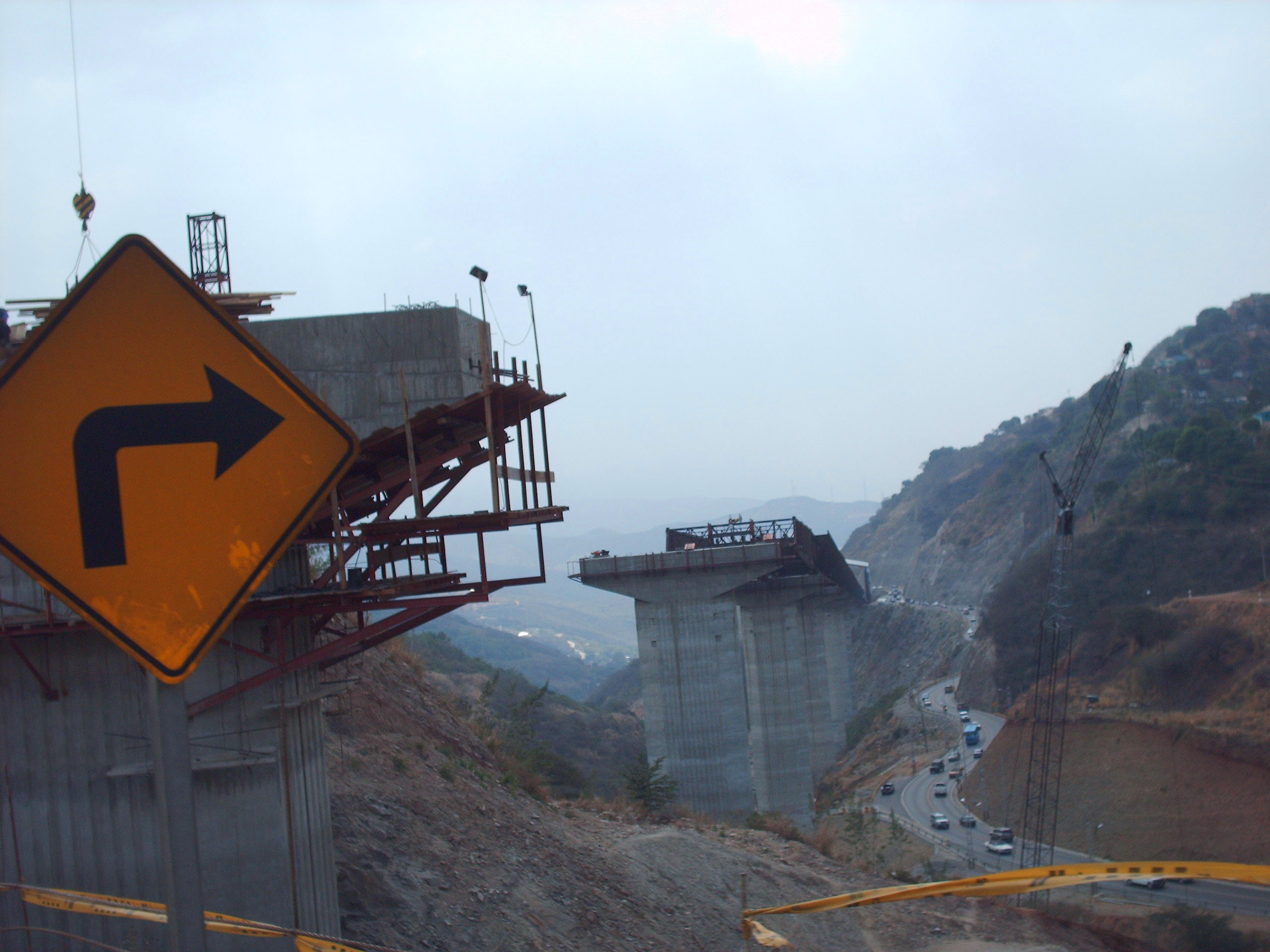 Nuevo Viaducto Caracas La Guaira